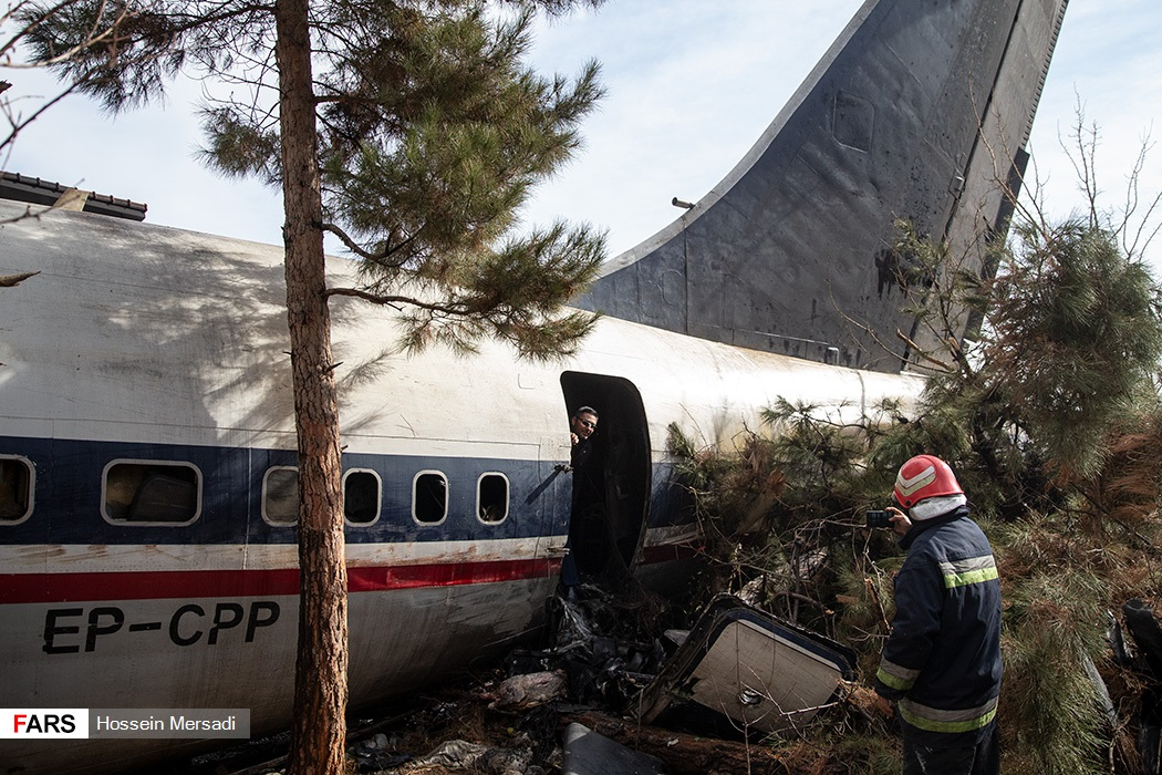 یک فروند هواپیمای باربری ۷۰۷ حامل گوشت از مبدا بیشکک کشور قرقیزستان، اقدام به فرود اضطراری در فرودگاه فتح البرز کرده که در هنگام فرود از باند خارج و پس از برخورد با دیوار انتهایی باند دچار آتش سوزی شد.